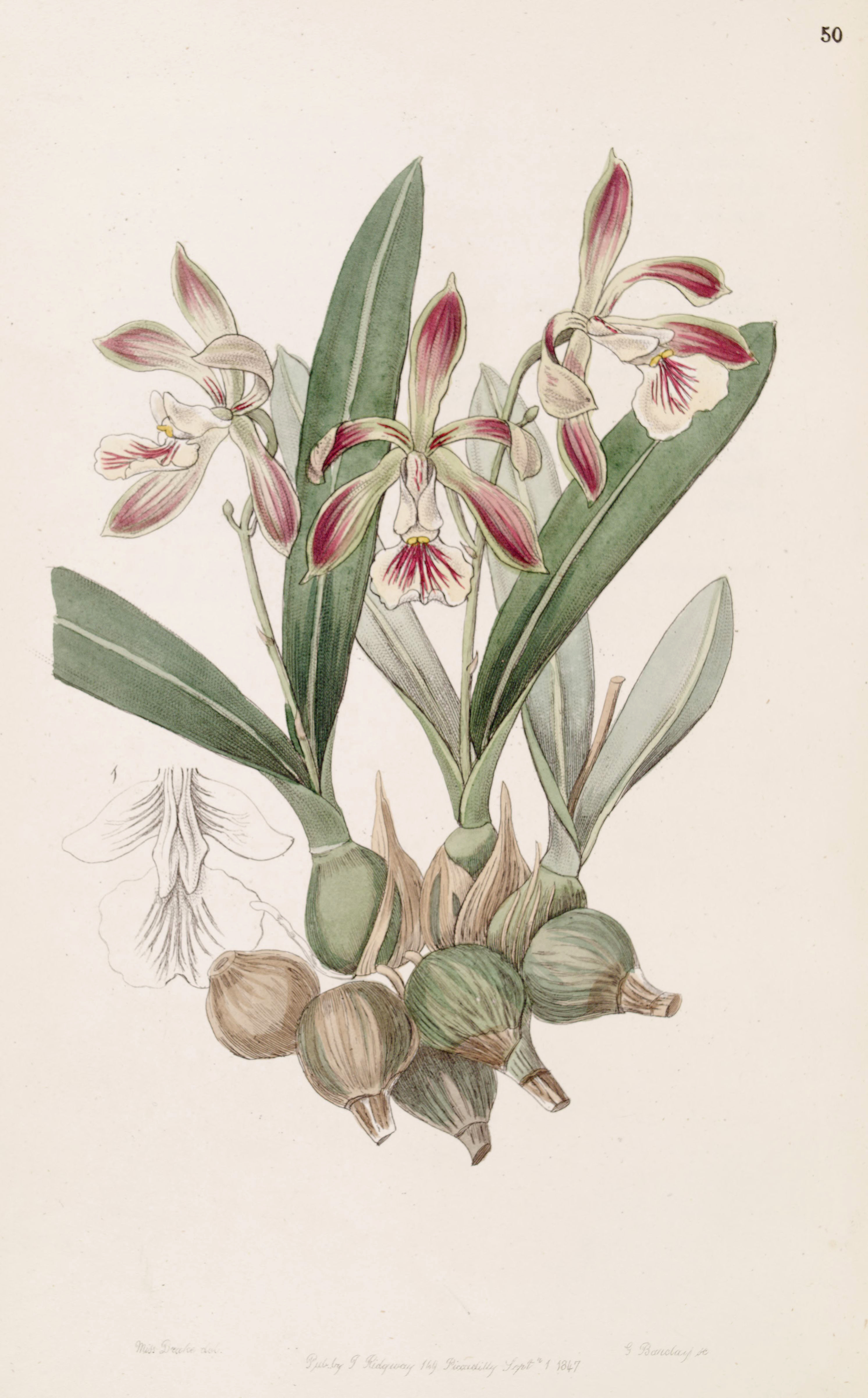 Encyclia pyriformis (as syn. Epidendrum pyriforme)